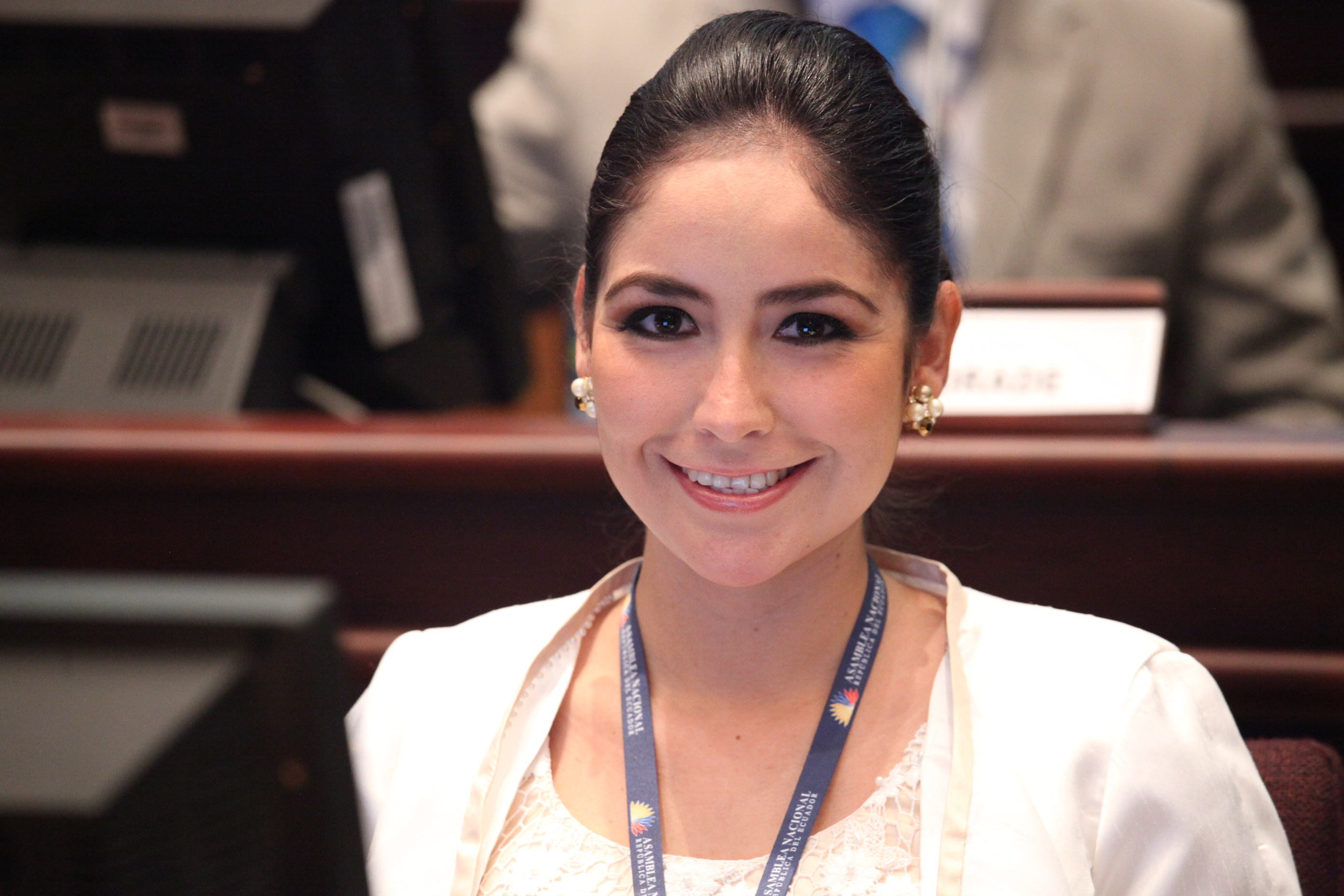 Foto: Hugo Ortiz Ron / Asamblea Nacional